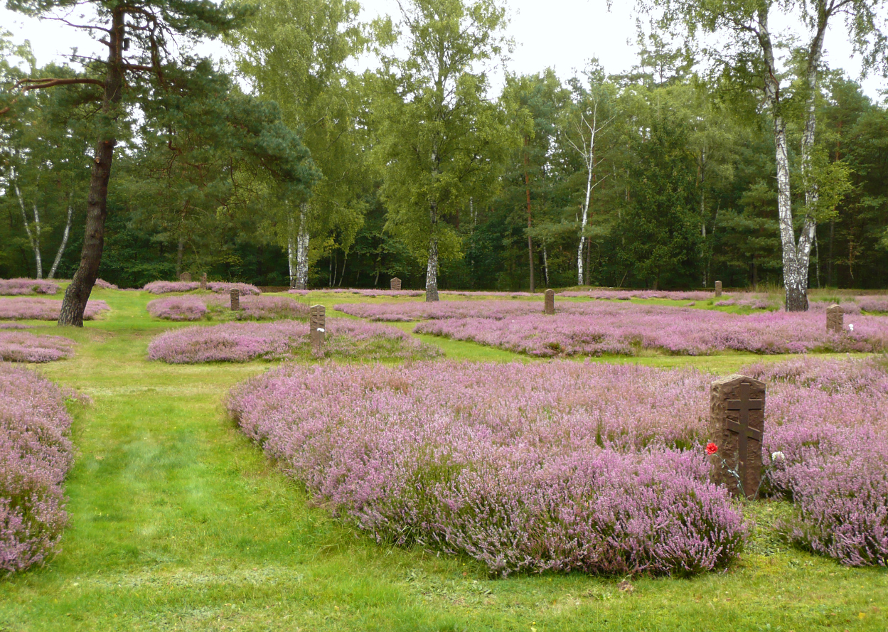 Sowjetischer Kriegsgefangenenfriedhof